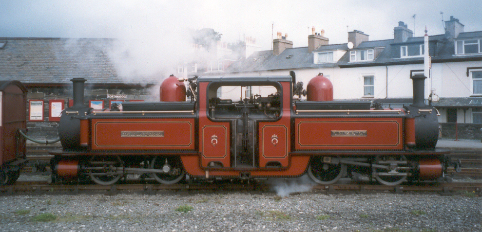 Porthmadog 2.9.1999, David Lloyd George, lokomotiva typu Fairlie, novostavba 1992. Foto Petr Sporer